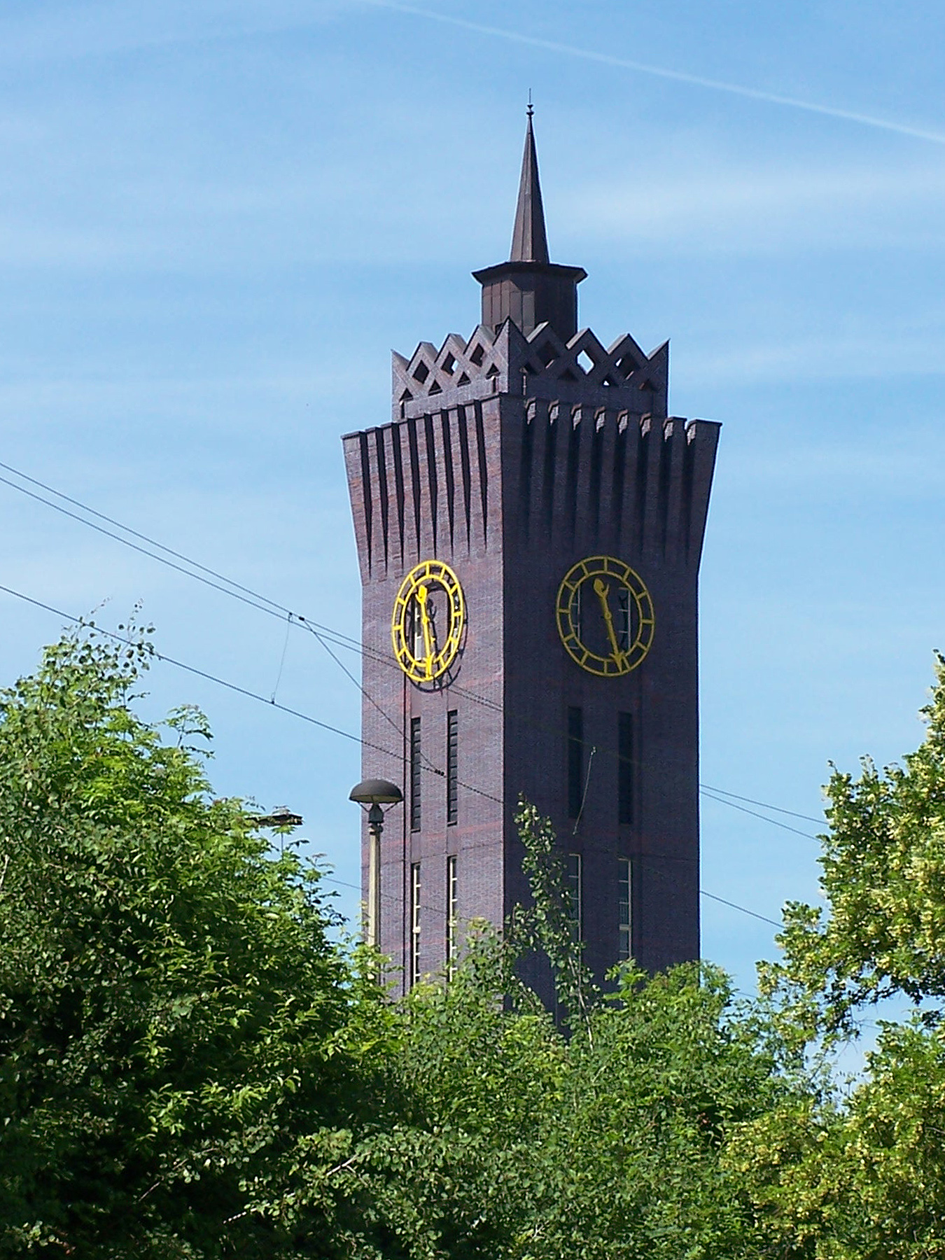 der Uhrturm der Fa. Schubert & Salzer in Chemnitz (erbaut 1927 von Erich Basarke)